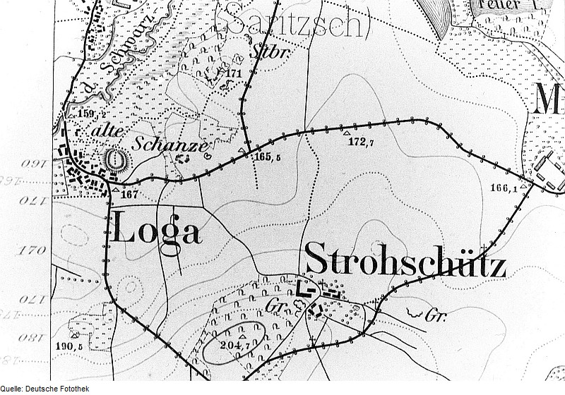 Original image description from the Deutsche Fotothek Neschwitz-Loga. Meßtischblatt, Sekt. Luttowitz, 1884 (Sign.: VII 167)